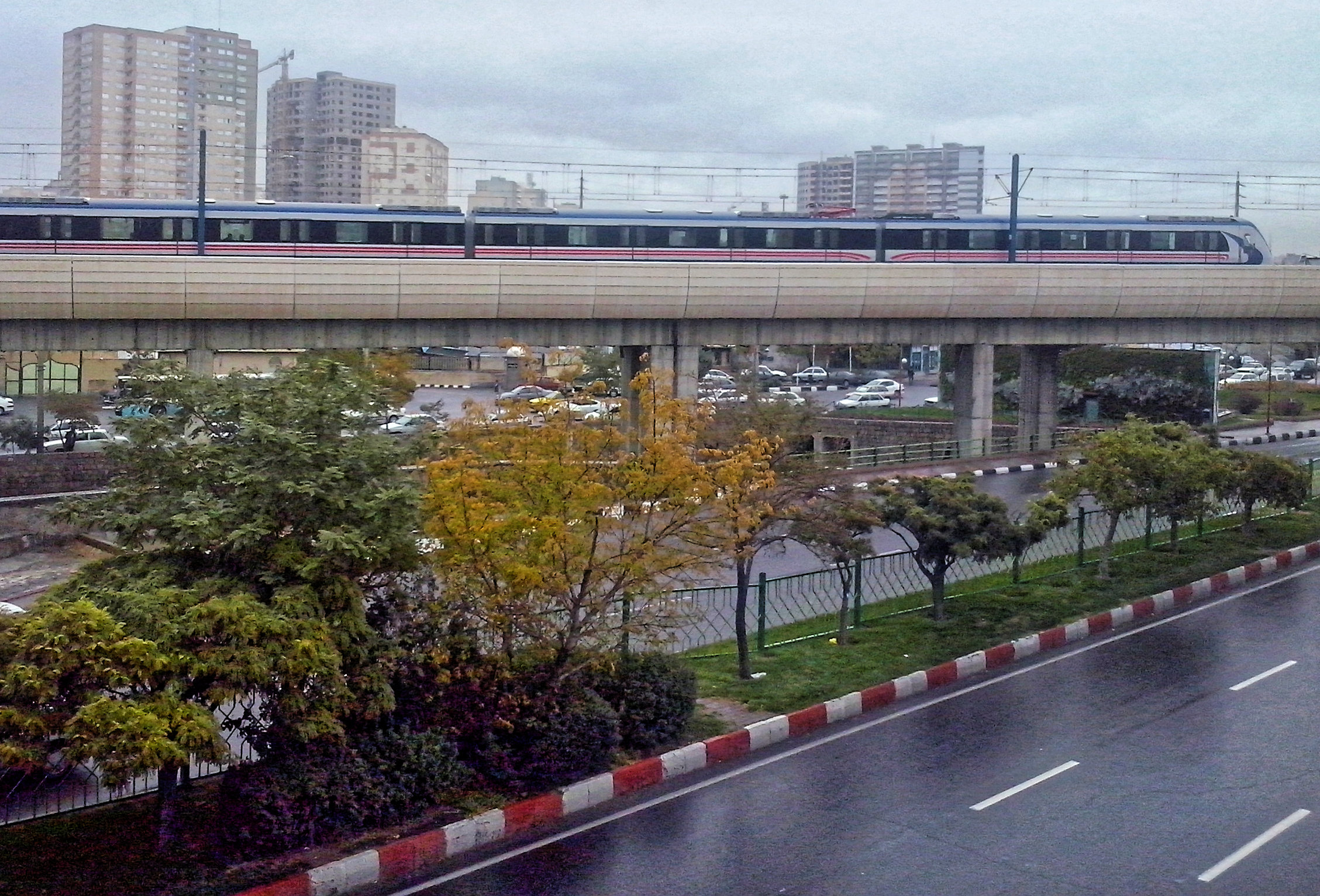 قطار متروی تبریز در حال خروج از ایستگاه ۲۹ بهمن به طرف ایستگاه شهریار.